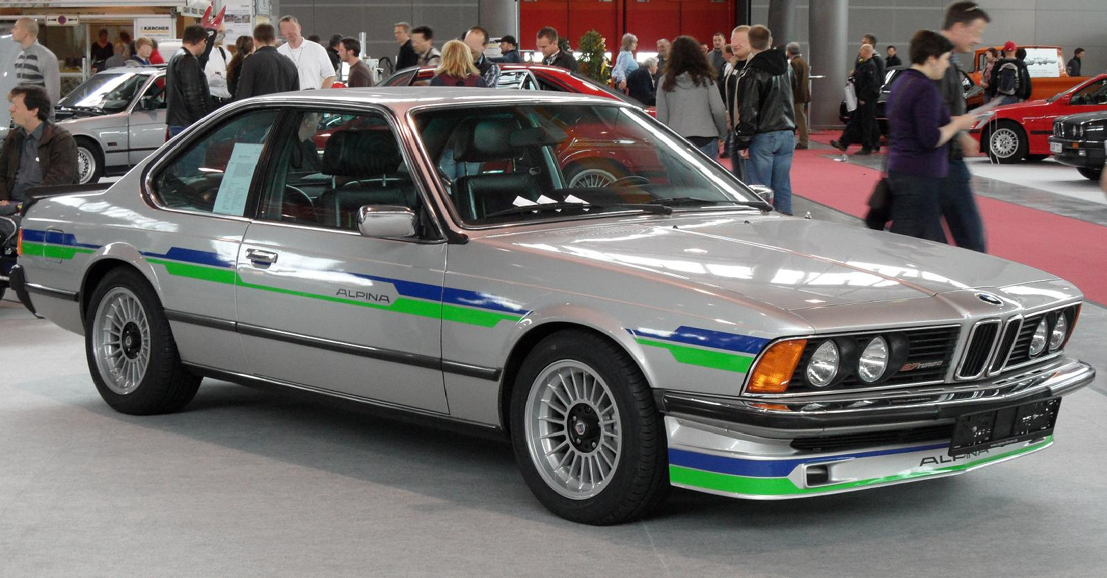 Alpina B7 turbo Coupé von 1981 mit der Alpina-Seriennummer 255, hergestellt vor dem 1982er Facelift (anderer Stoßfänger hinten)